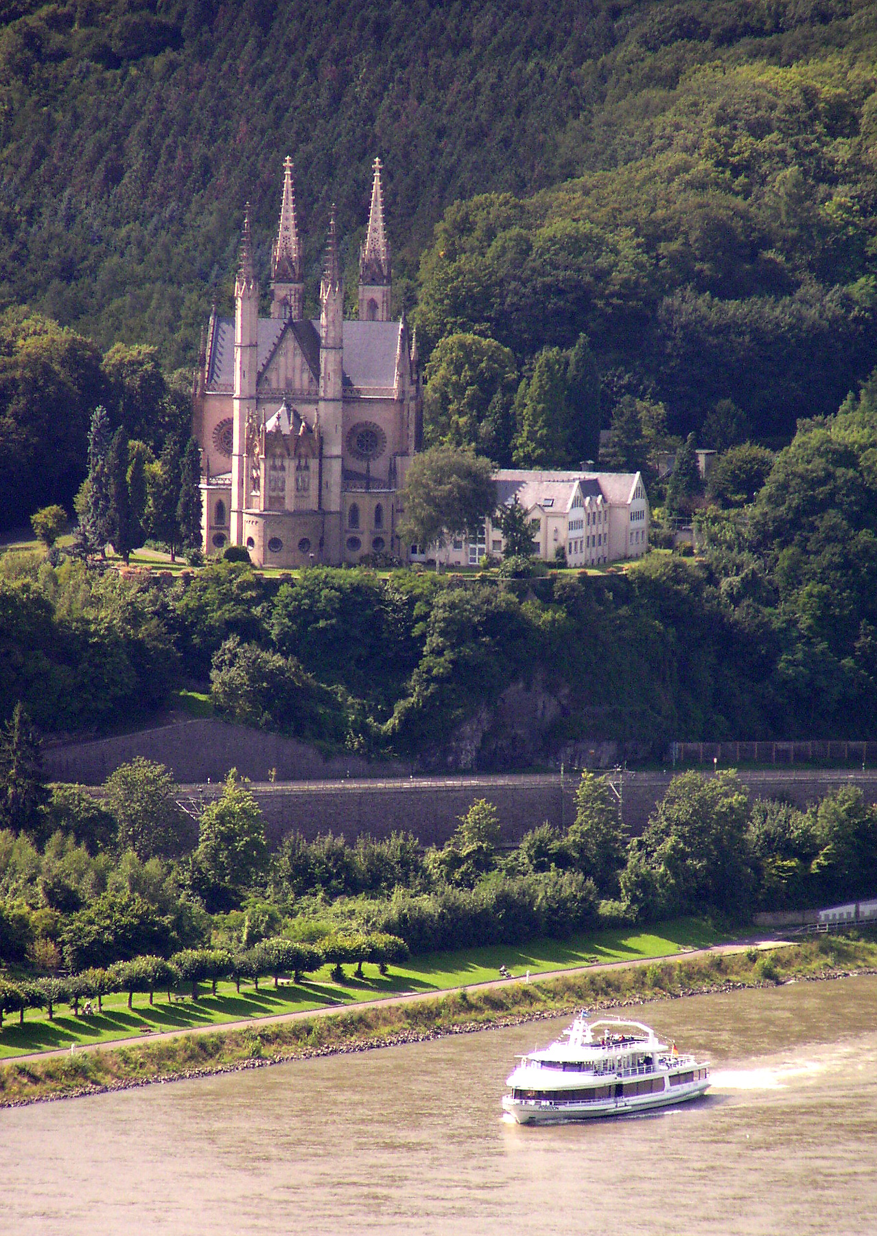 Apollinariskirche Remagen am Rhein